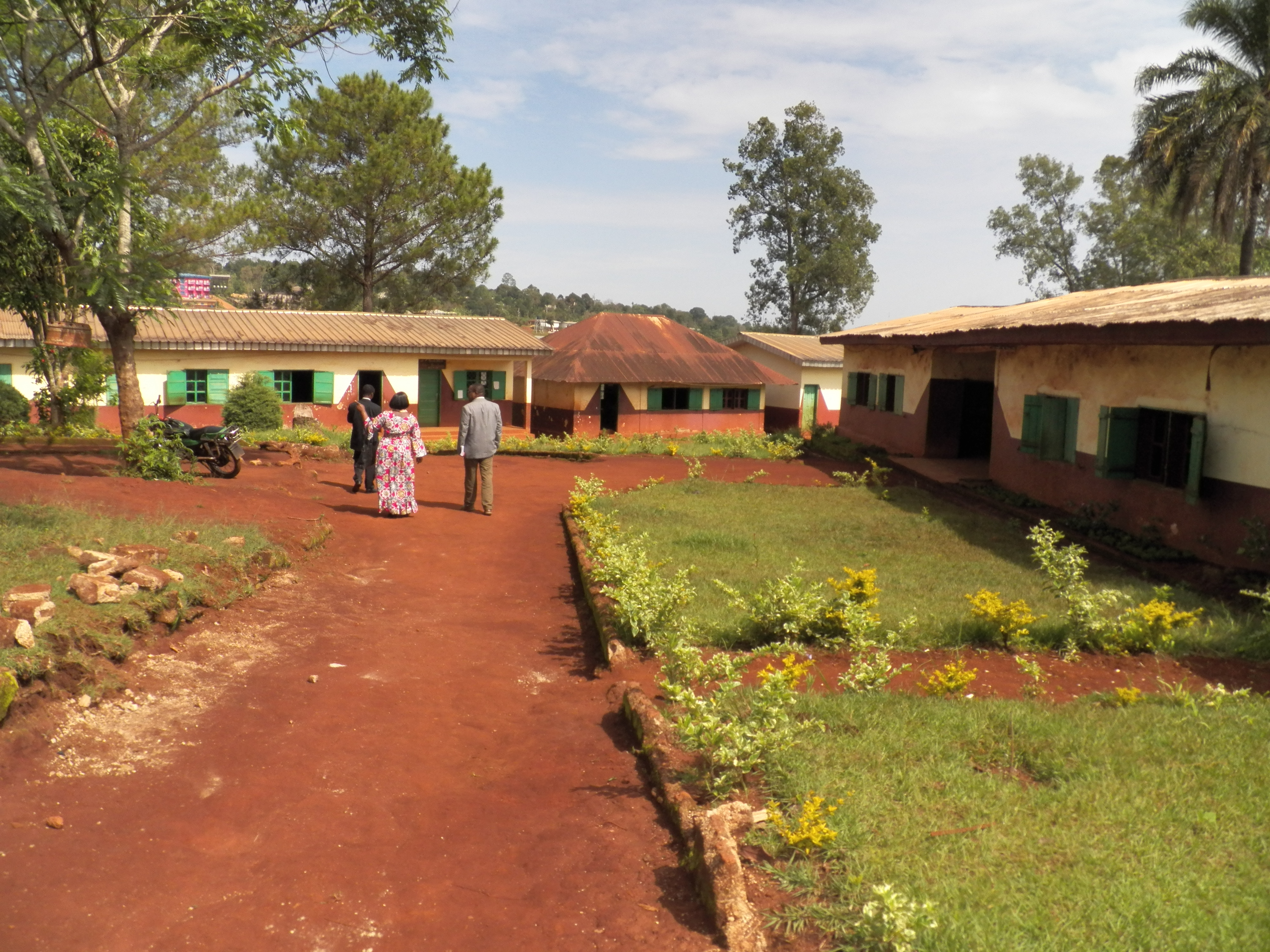 Ecole publique de Mbô